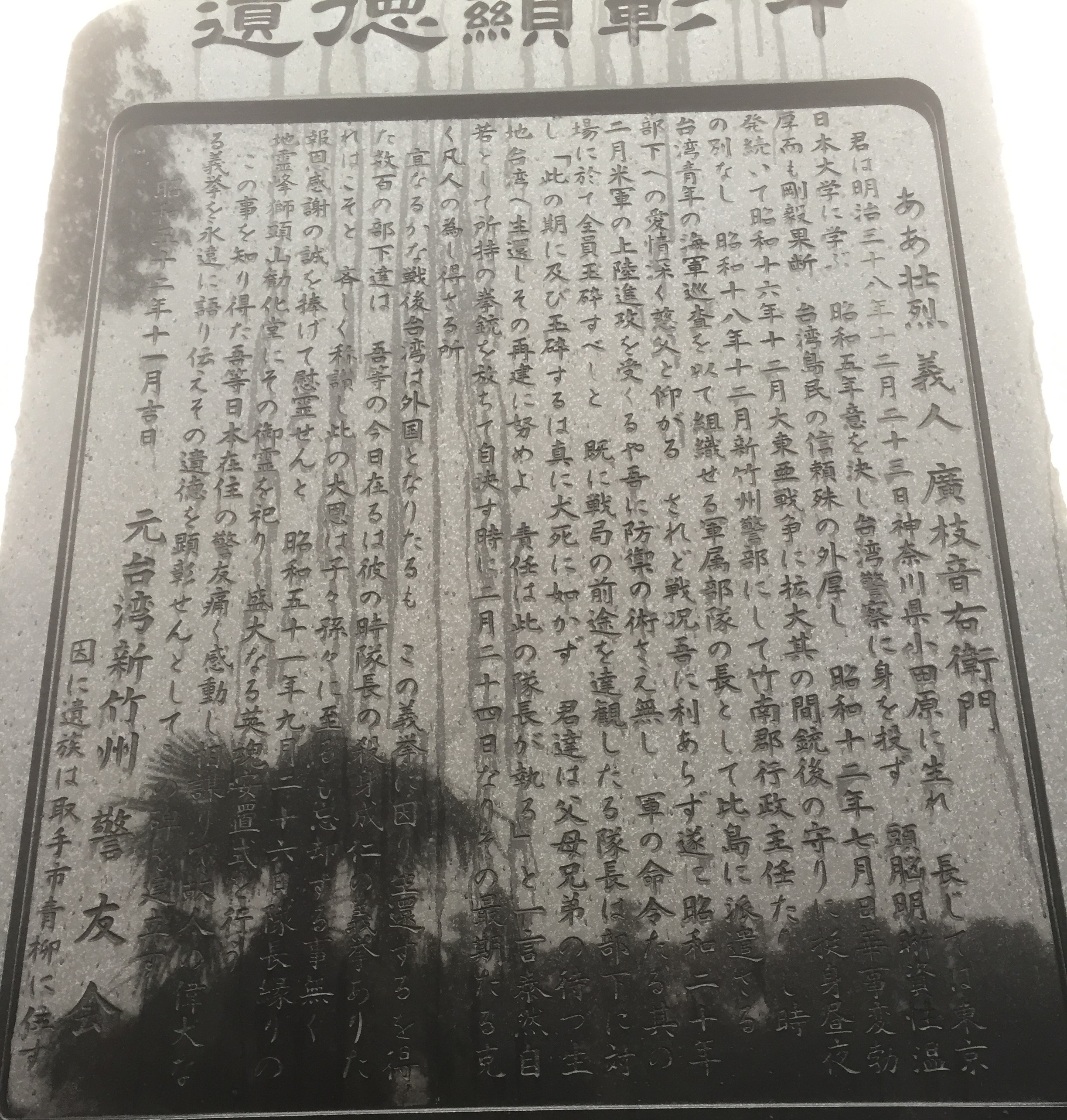 弘経寺にて撮影